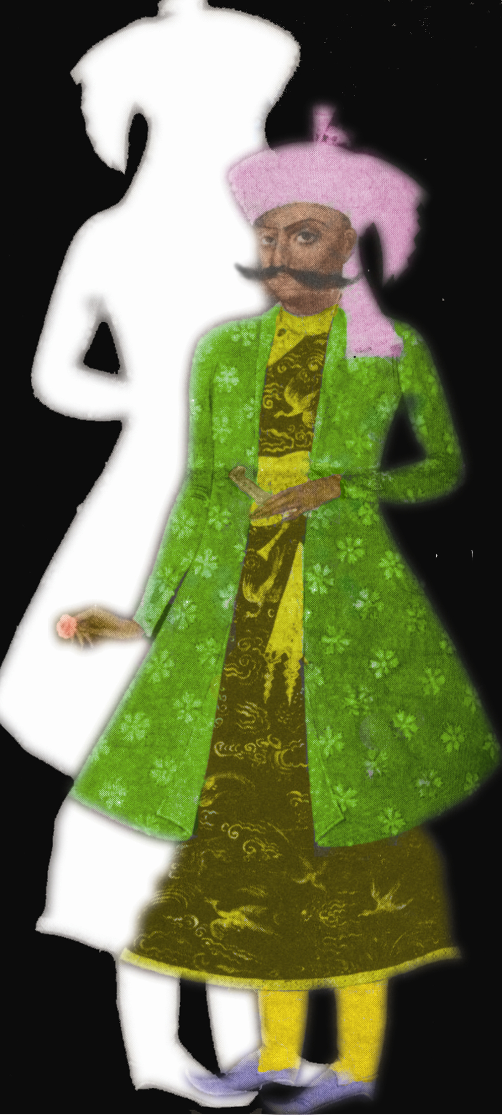 گنجعلیخان، حاکم بزرگ کرمان